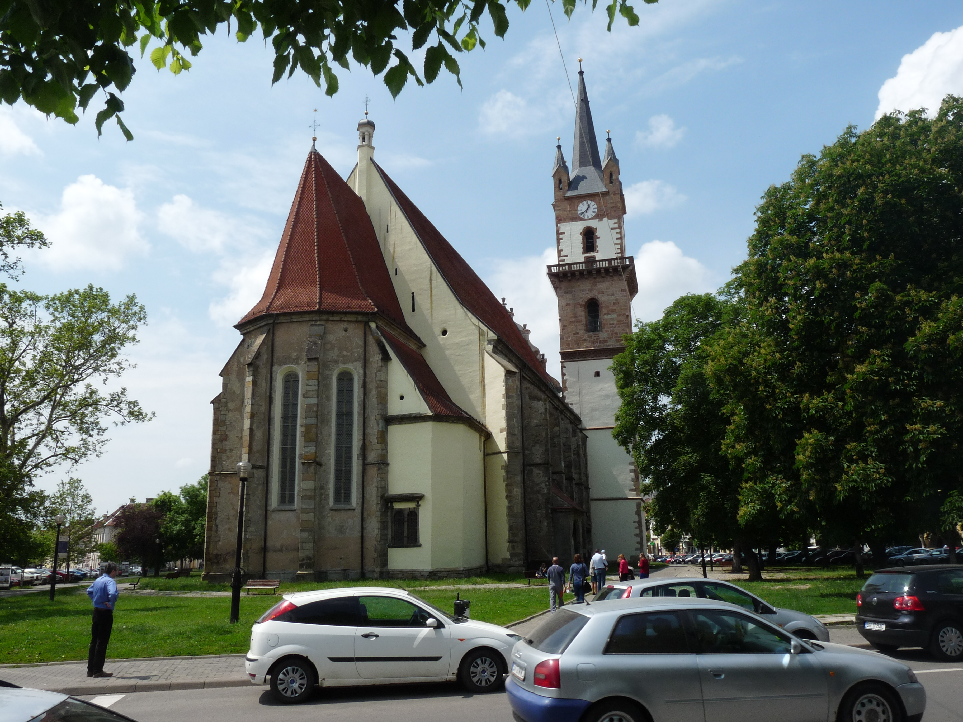 De evangelische kerk in Bistrița